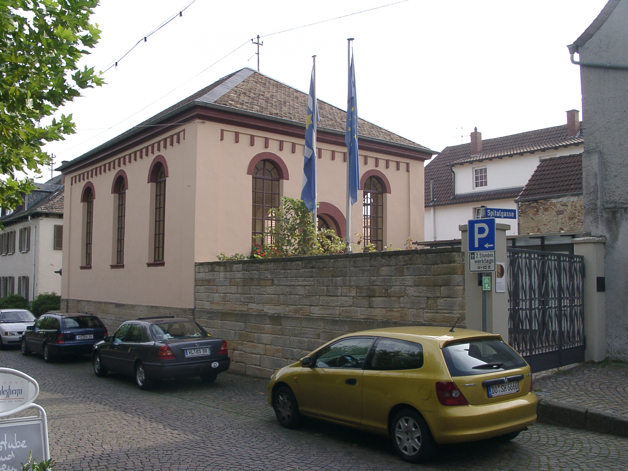 Die ehemalige Synagoge in Deidesheim